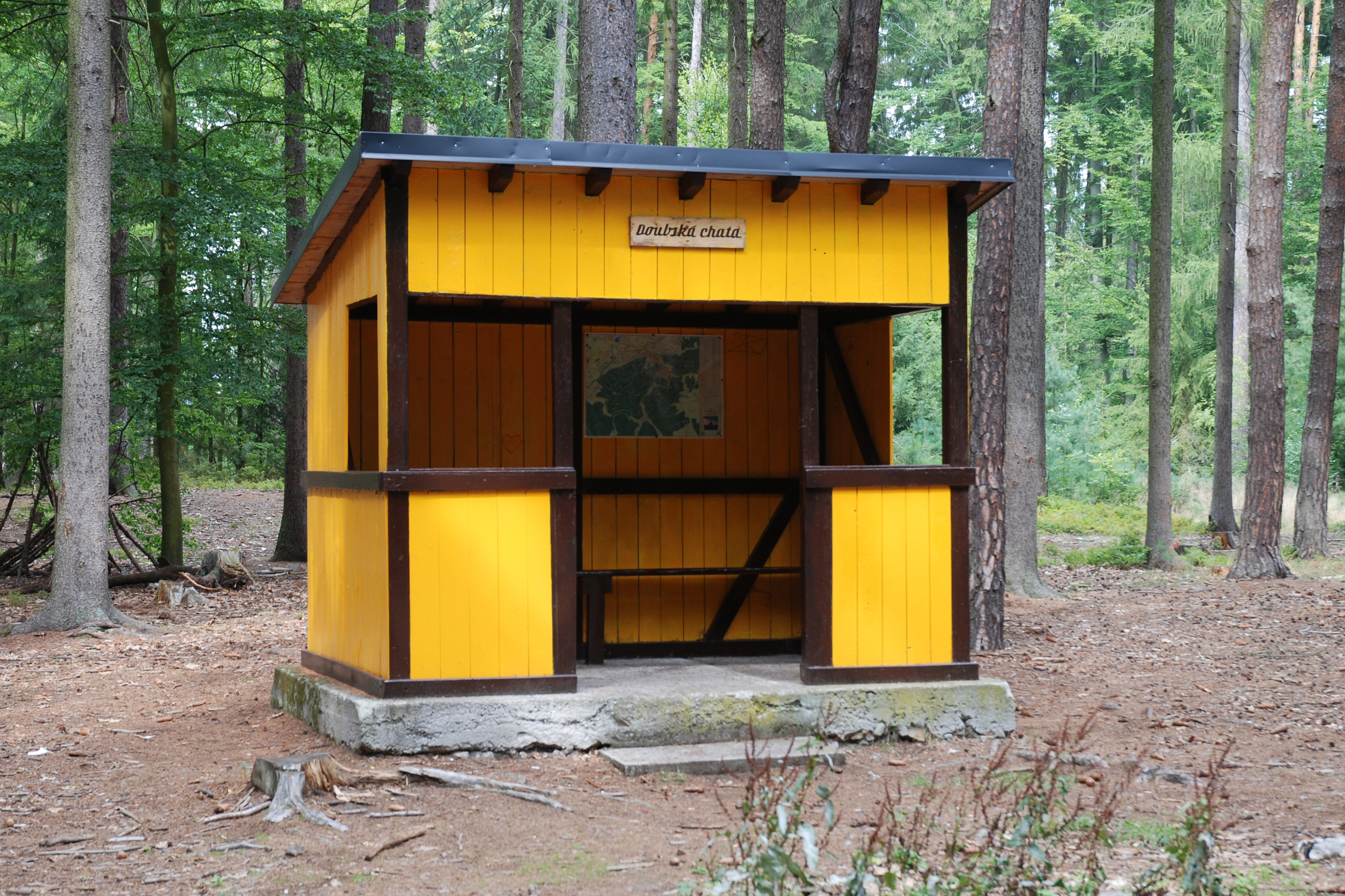 Doubská chata v karlovarských lázeňských lesích při rozcestí cest Doubské a Tuhnické